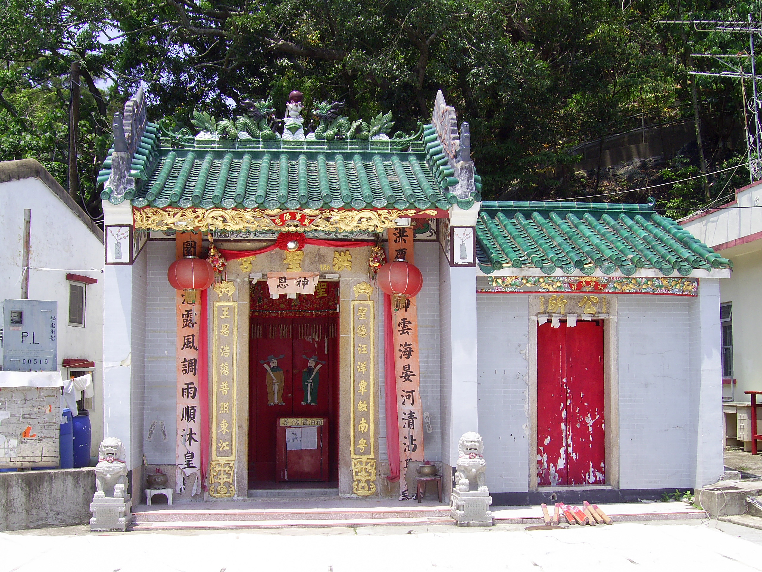 中文（香港）: 西貢布袋澳洪聖廟